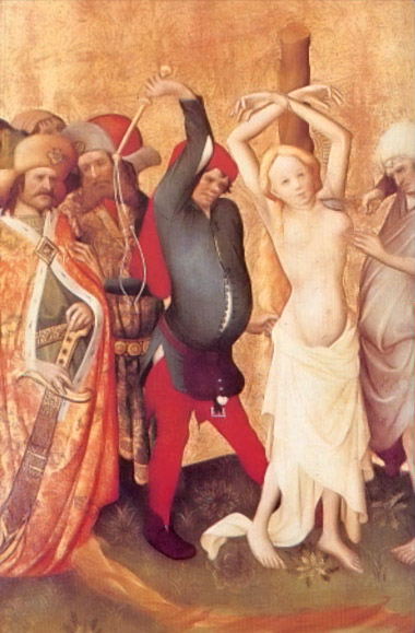 Meister Francke, (Frater Francke) Geißelung der hl. Barbara from the Barbara Altarpiece